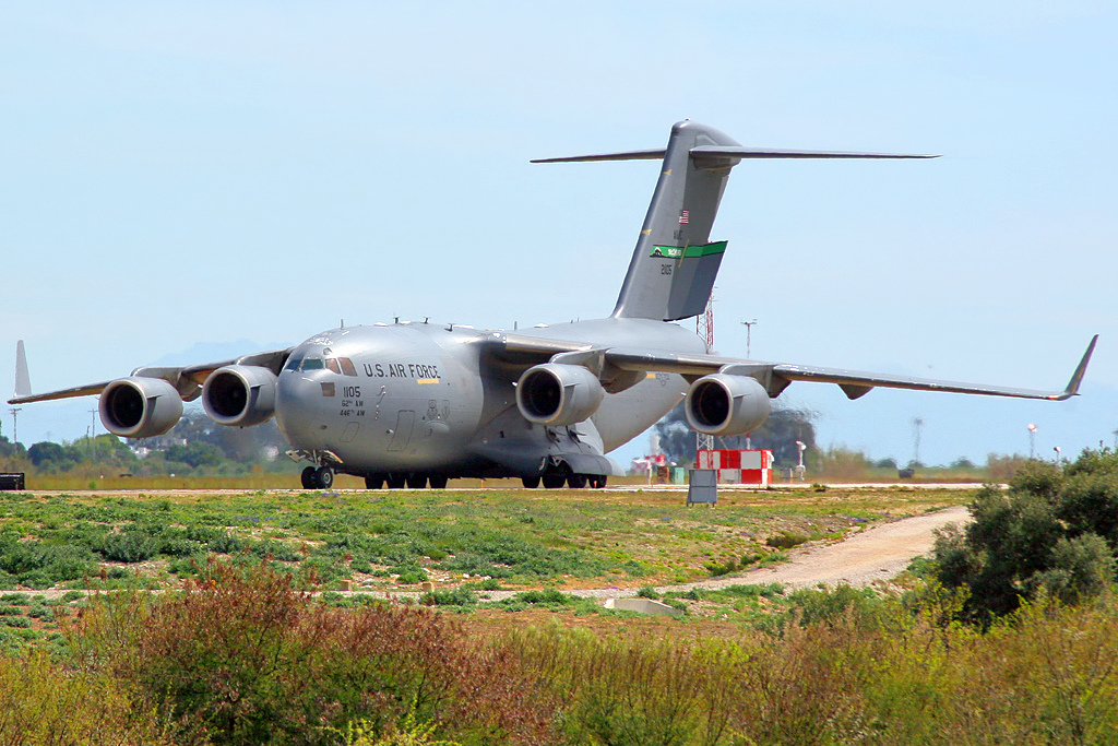 Rota (LERT-RTA) Aeronaval Base.